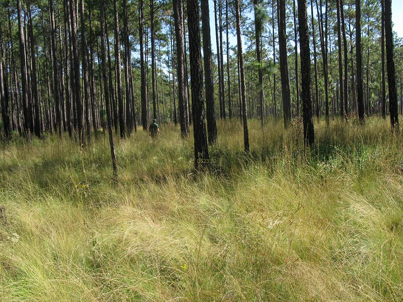 Nolina atopocarpa Lokalität im Apalachicola Wald in Florida